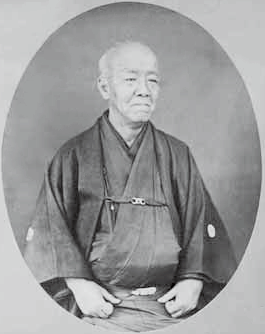 松平斉民の肖像写真。